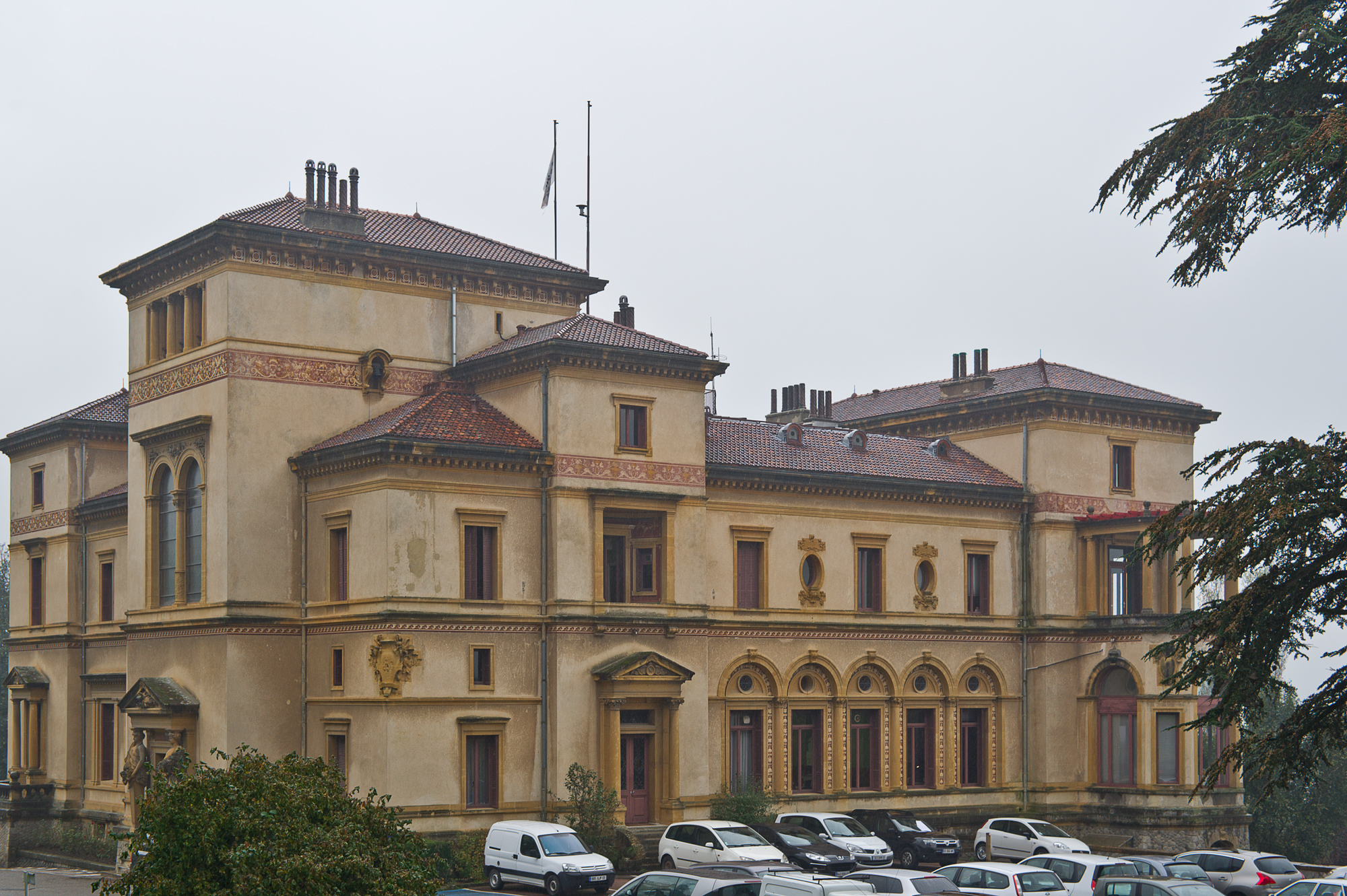 Villa La Pérollière, (Inscrit, 1992) .